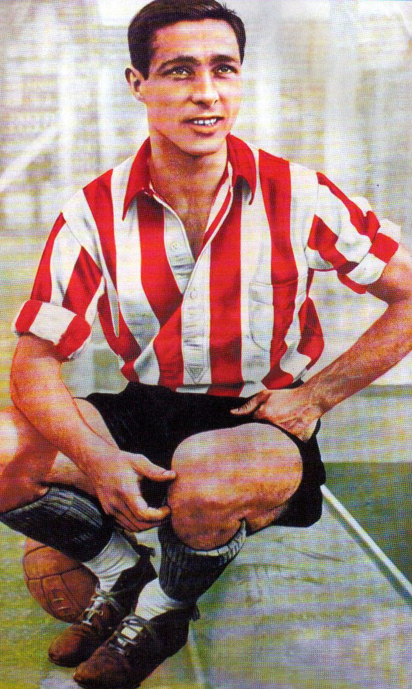 Alberto Zozaya, uno de los tres máximos goleadores de la historia profesional de Estudiantes.